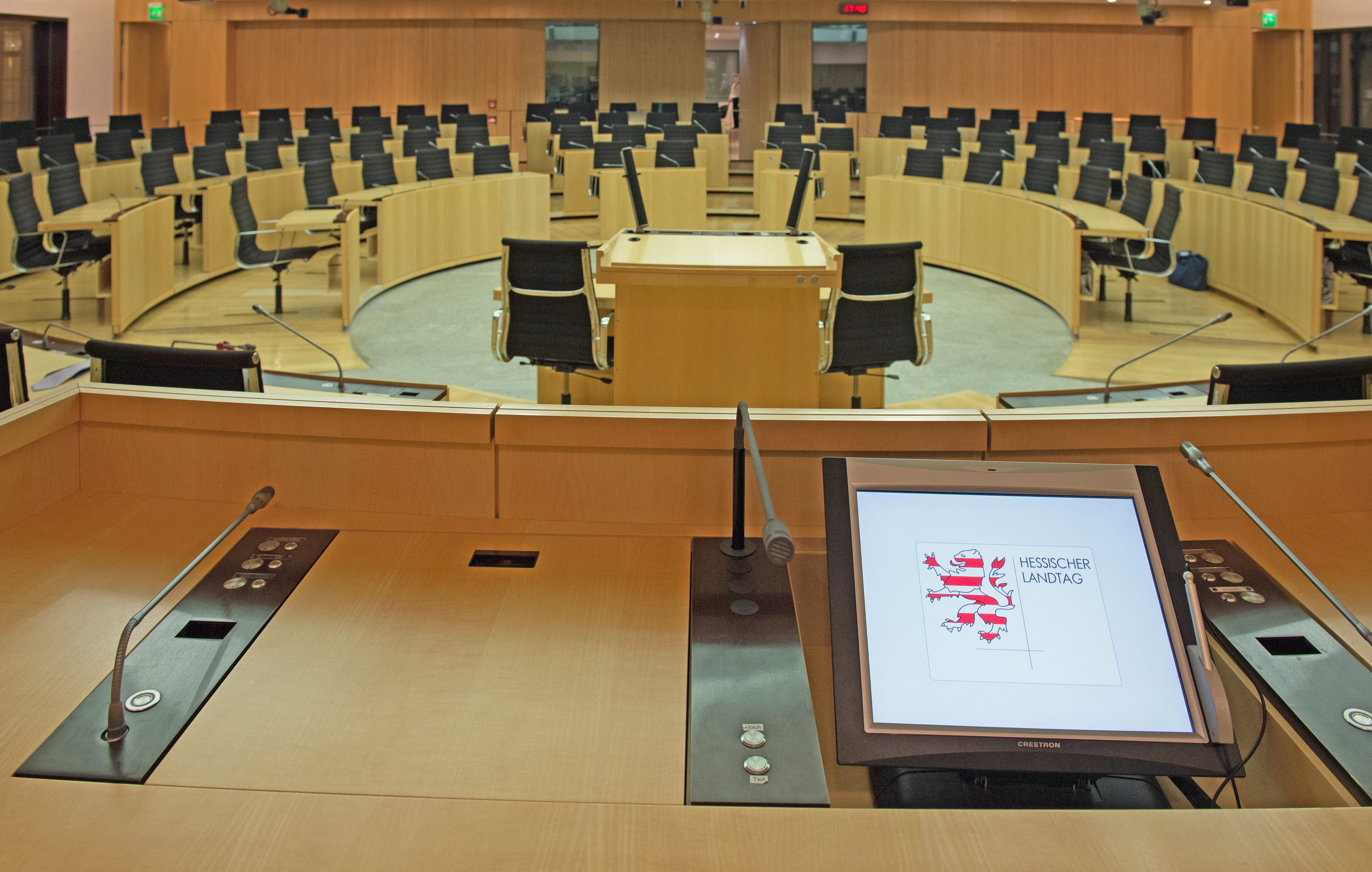 Wiki loves Parliaments im Hessischen Landtag am 4. Februar 2016 - Making Of